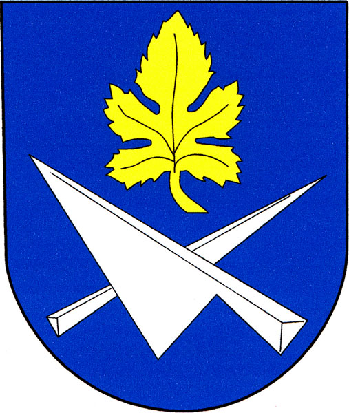 Znak obce Mělčany